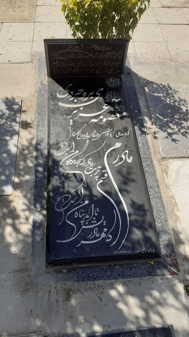 مهوش یا همان معصومه عزیزی بروجردی که سنگ مزارهای قبلی اش توسط مخالفین شکسته شد واین سنگ جایگزین سنگ قبلی گردید.